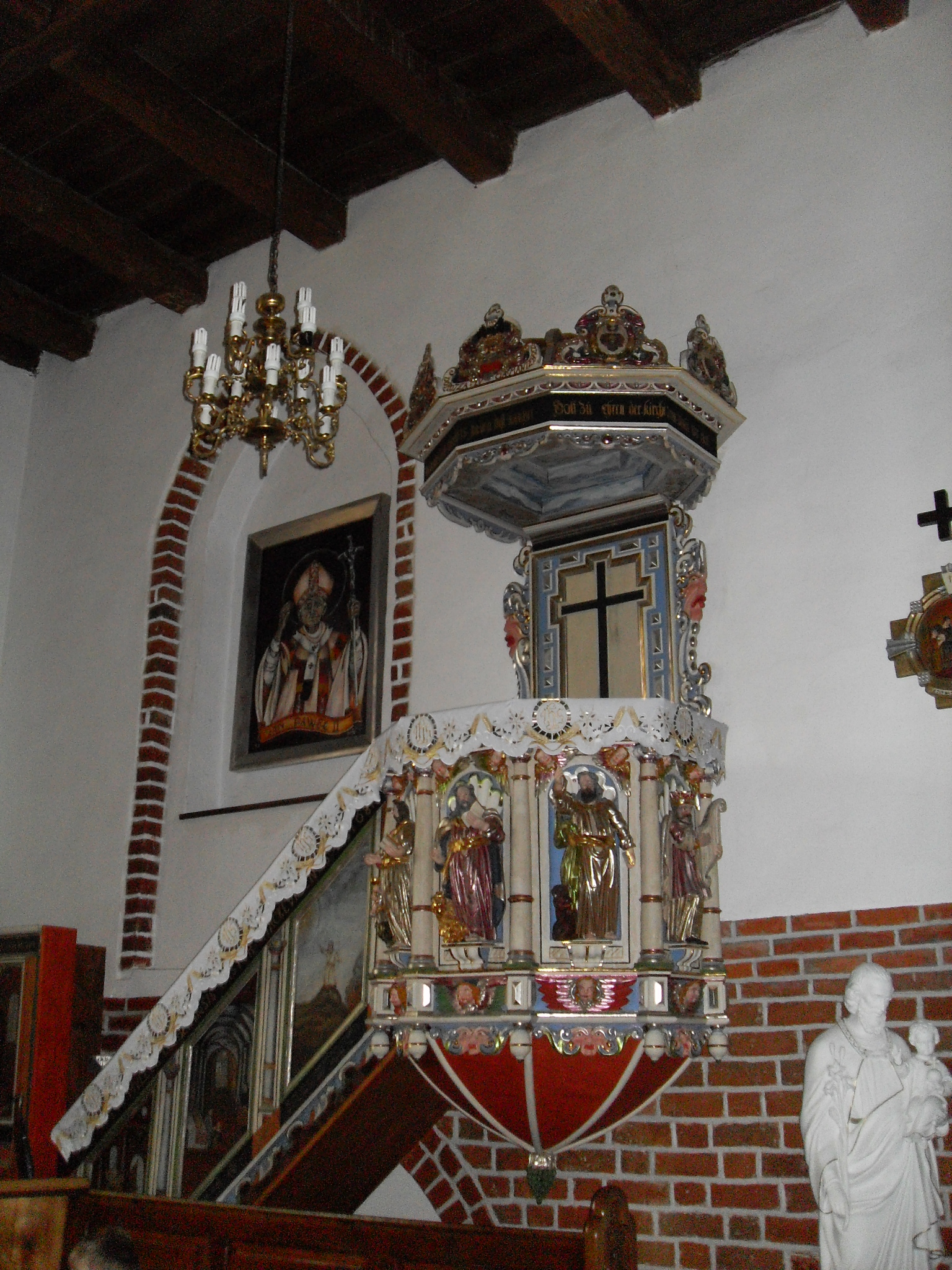 Cerkwica - Barocke Kanzel von 1681